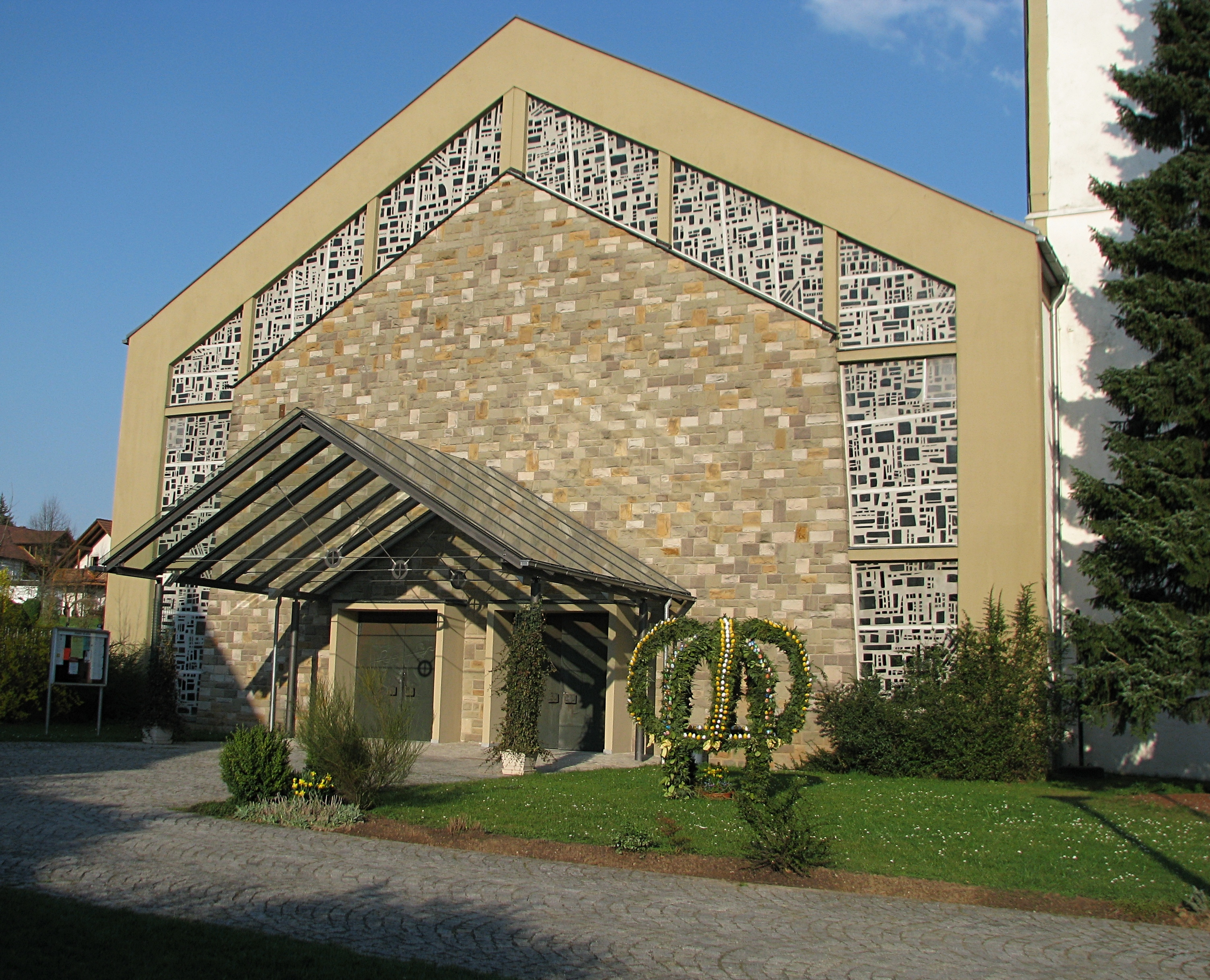 Eingangsbereich der Pfarrkirche Sankt Vitus in Wülfershausen an der Saale, Osterzeit